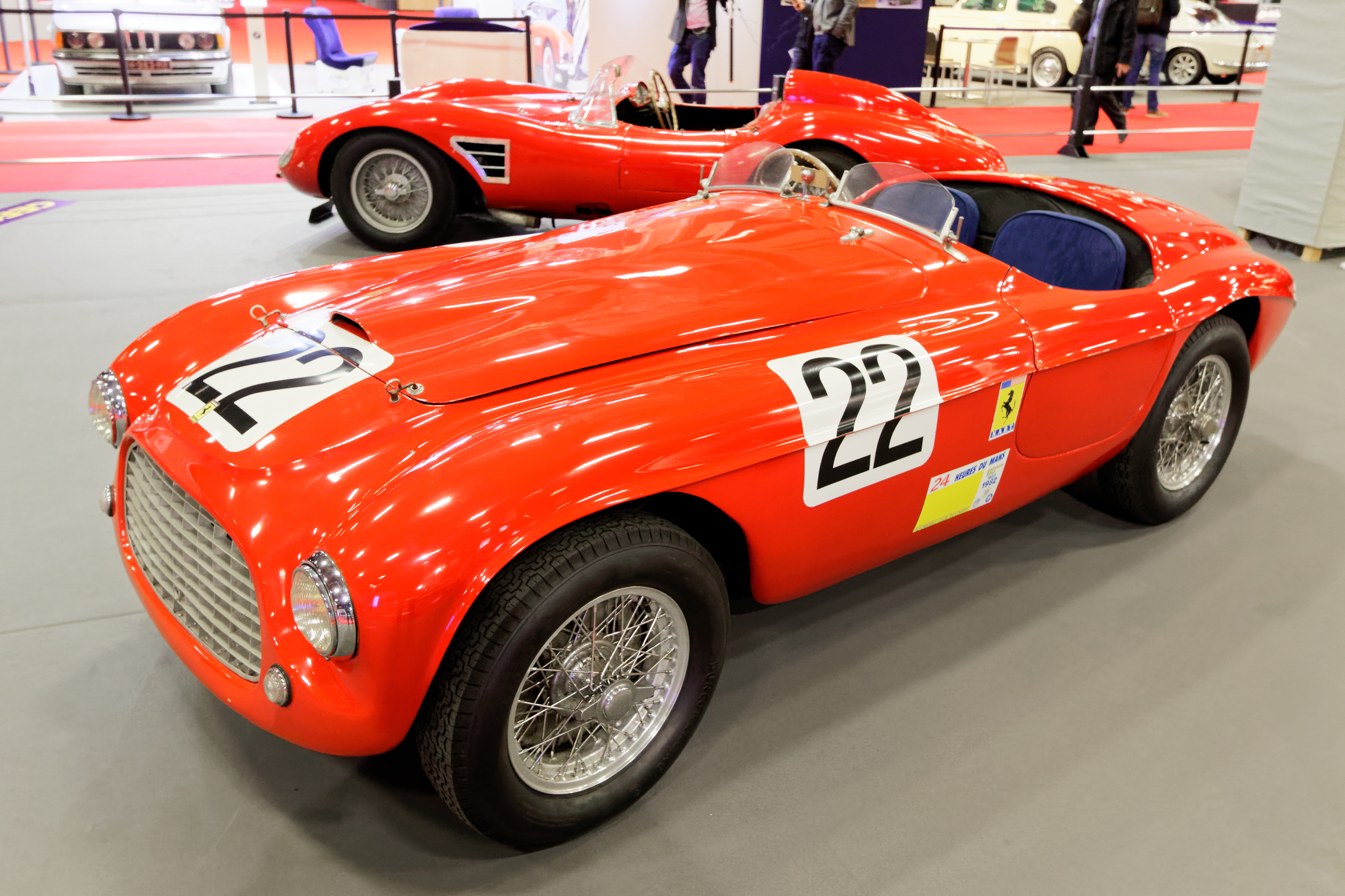 Une Ferrari 166 MM de 1949 exposée lors du salon Rétromobile 2017.